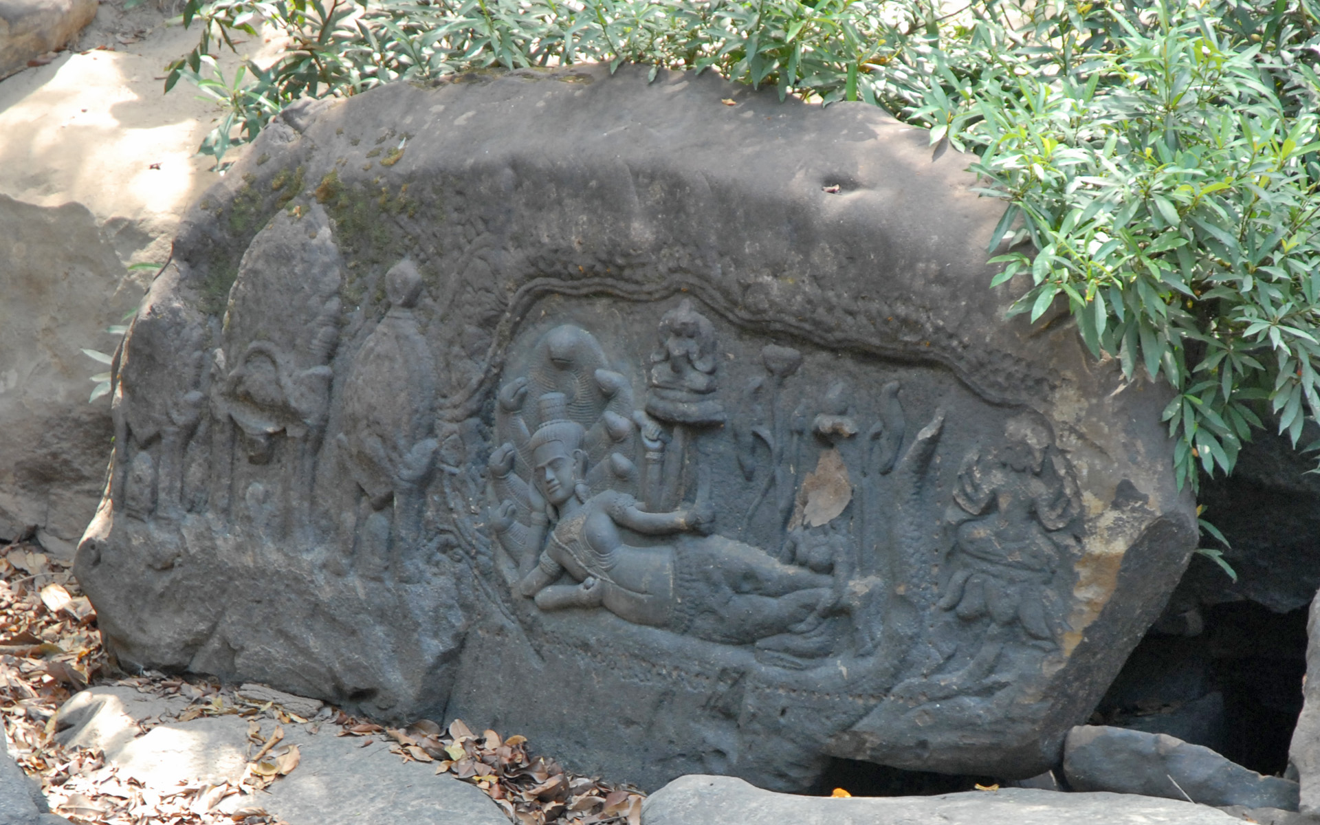 La rivière aux mille Linga